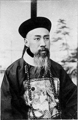 1910年山东巡抚孙宝琦